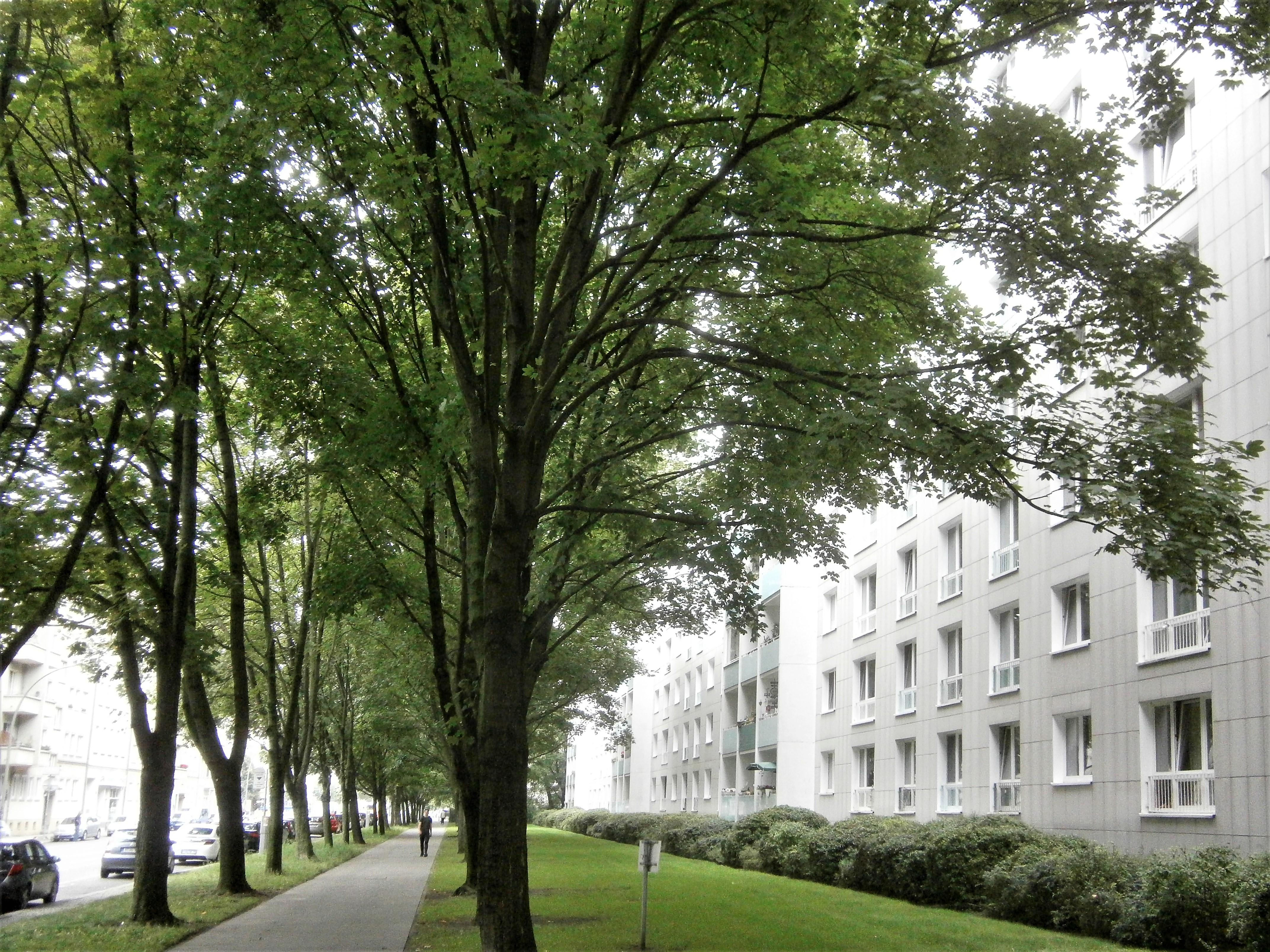 Die Andreasstraße ist eine Straße im Berliner Bezirk Friedrichshain-Kreuzberg, Ortsteil Friedrichshain. Angelegt wurde sie 1862 auf vorherigen Gartenland und 1863 benannt. Bis um 1900 waren die Grundstücke bebaut und bis 1930 wurde verdichtet. Bei Luftangriffen im Zweiten Weltkrieg wurde die Gebäude schwer getroffen. So ist die Straße seit den 1950er Jahren mit wiederhergestellten Altbauten, aber besondres durch Plattenbau-Wohnblöcke aber seit 1990 auch durch Hotel- und Bürobauten im Umfeld des Ostbahnhofs charakterieisiert. Das Bild zeigt: Der zehngeschossige QP-Wohnblock Andreasstraße 29—36 an der Ostseite wurde um 10 Meter gegen die Straßenfront versetzt.